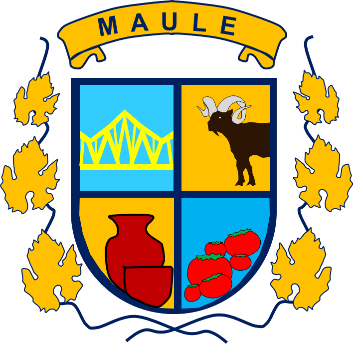 Armas de la comuna de Maule (Chile)